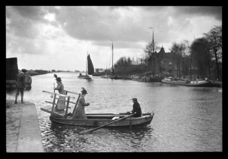 De Schinkel ca. 1900. De voormalige pont bij de Vlietstraat, in de verte De Nieuwe Meer